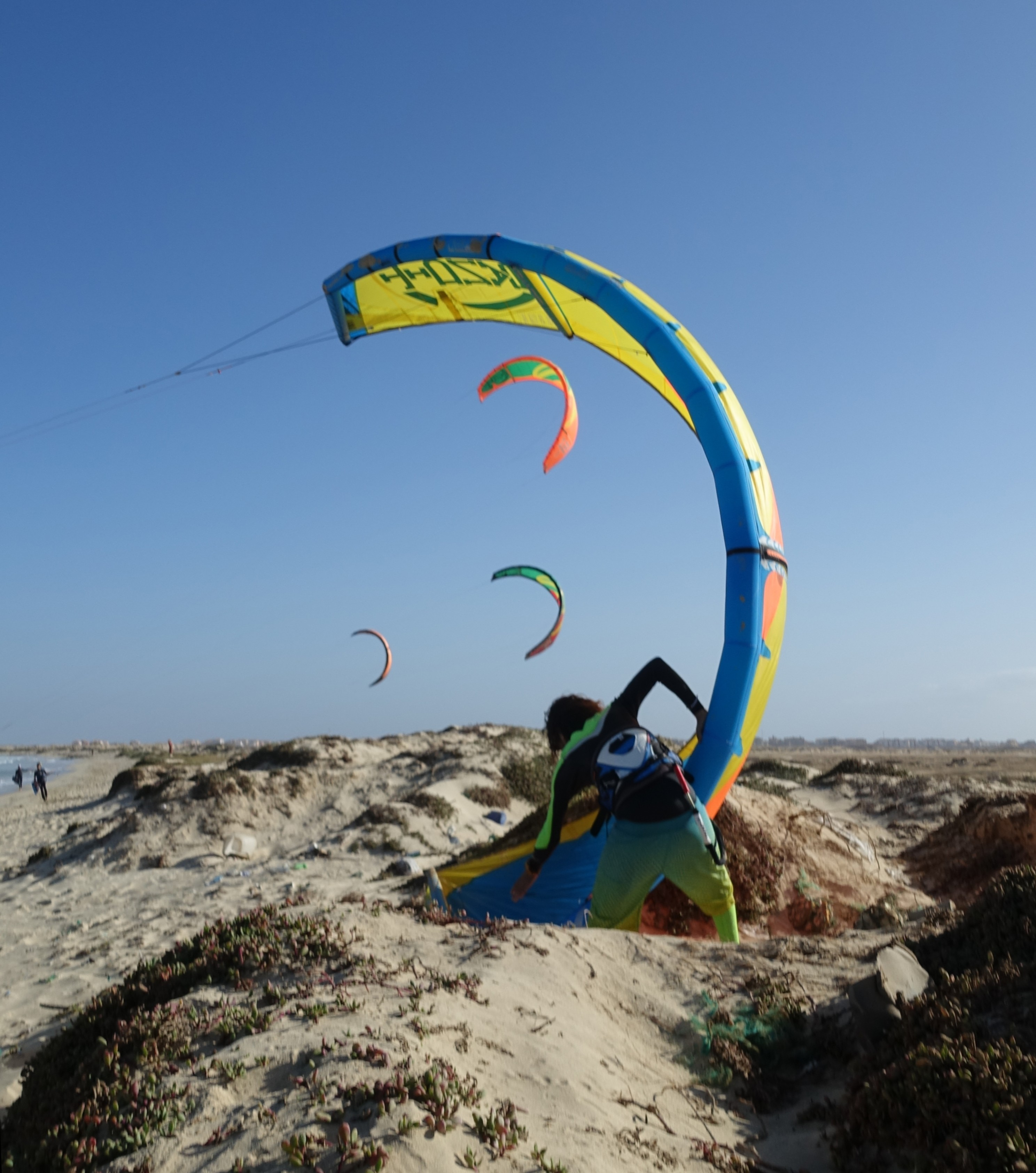 Santa Maria - Costa da Fragata, Kite Surfer